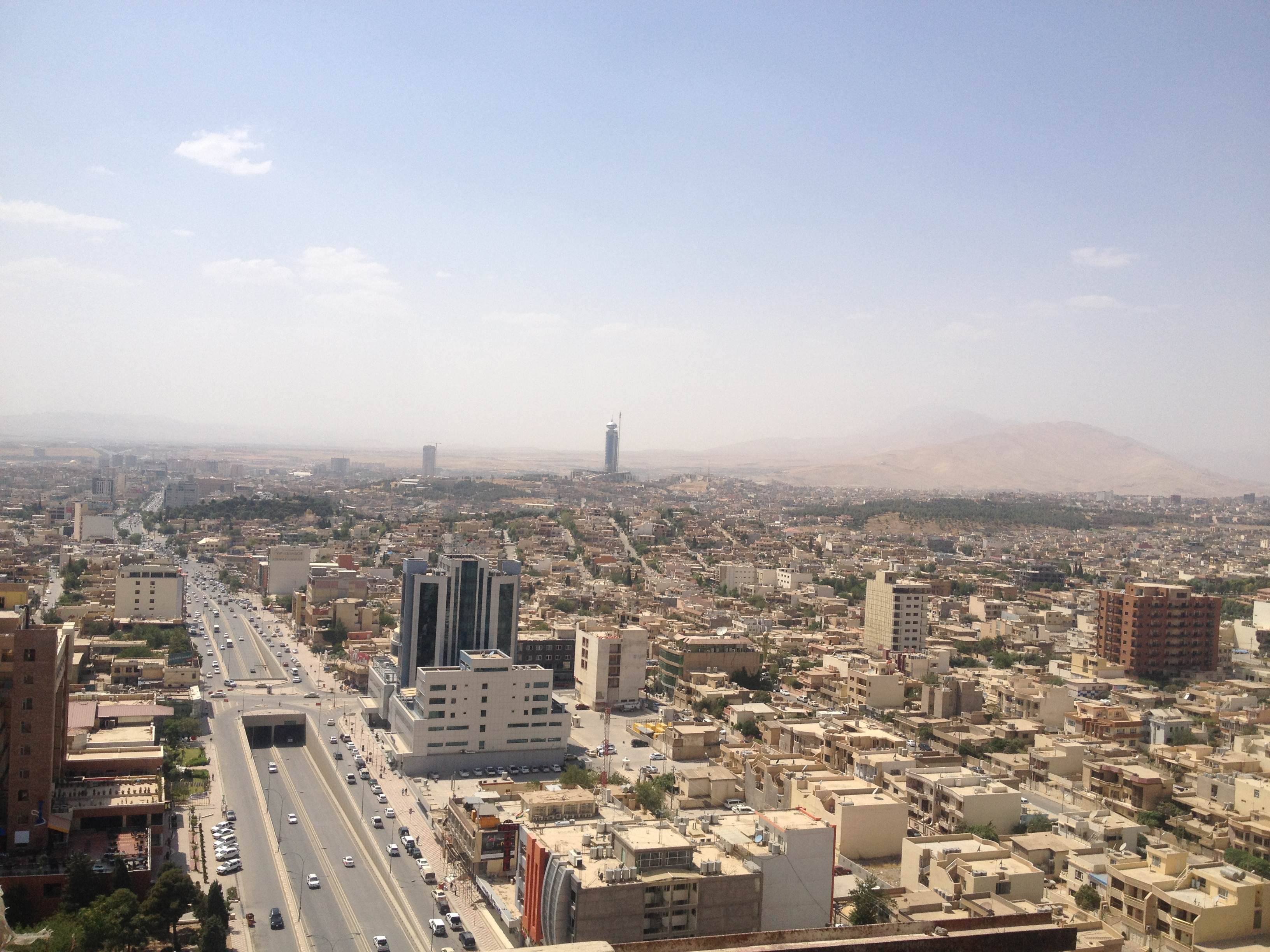 As Sulaymaniyah